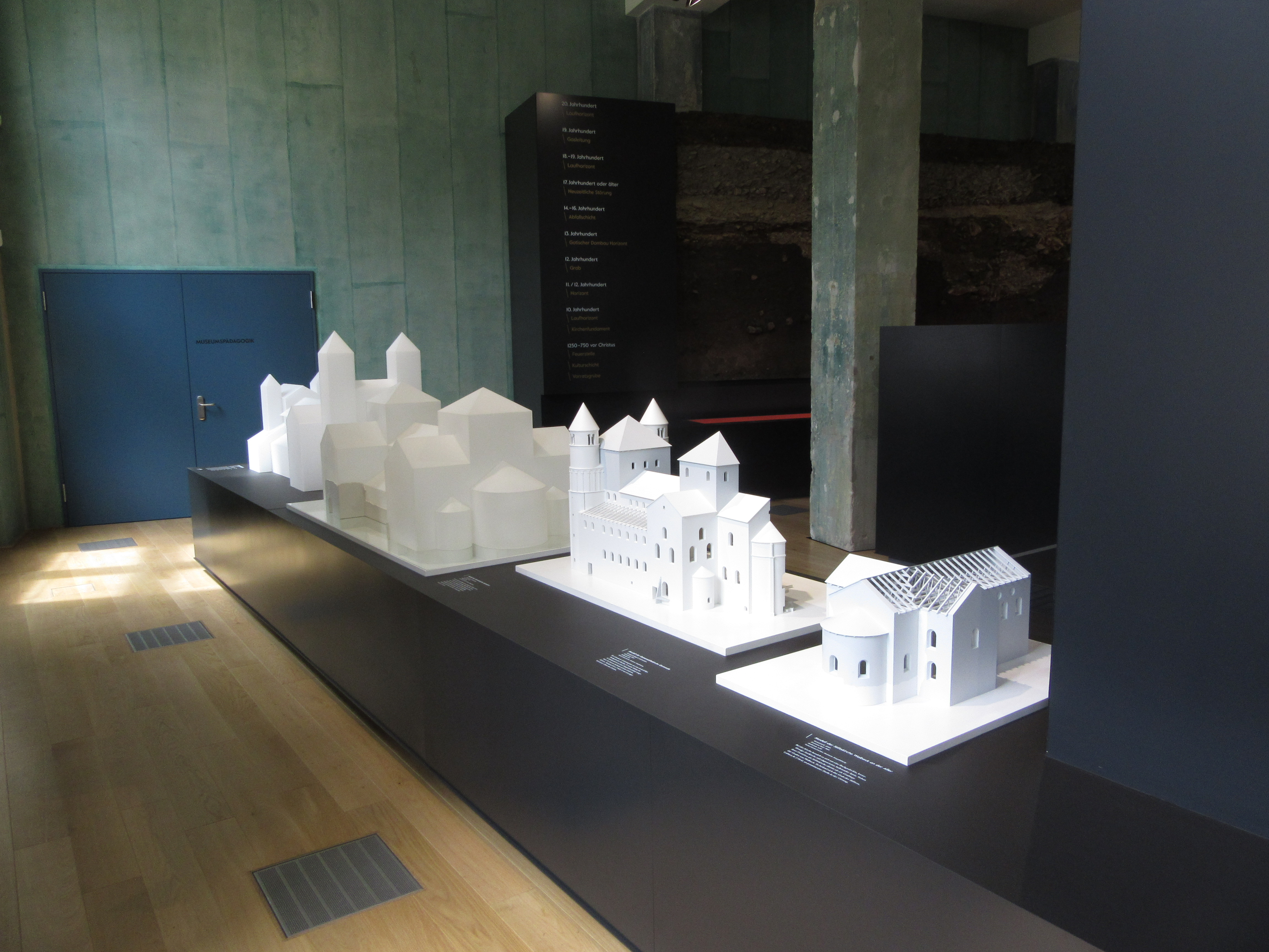 Dommuseum Ottonianum Magdeburg